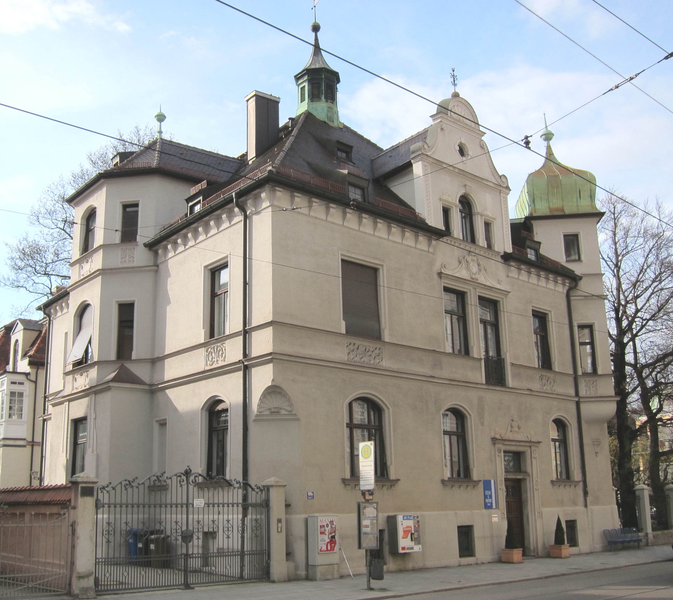 Ismaninger Straße 65 a; Villenartiges Eckhaus, deutsche Renaissance, bez. 1896, von Alfons Hering als eigenes Wohnhaus.